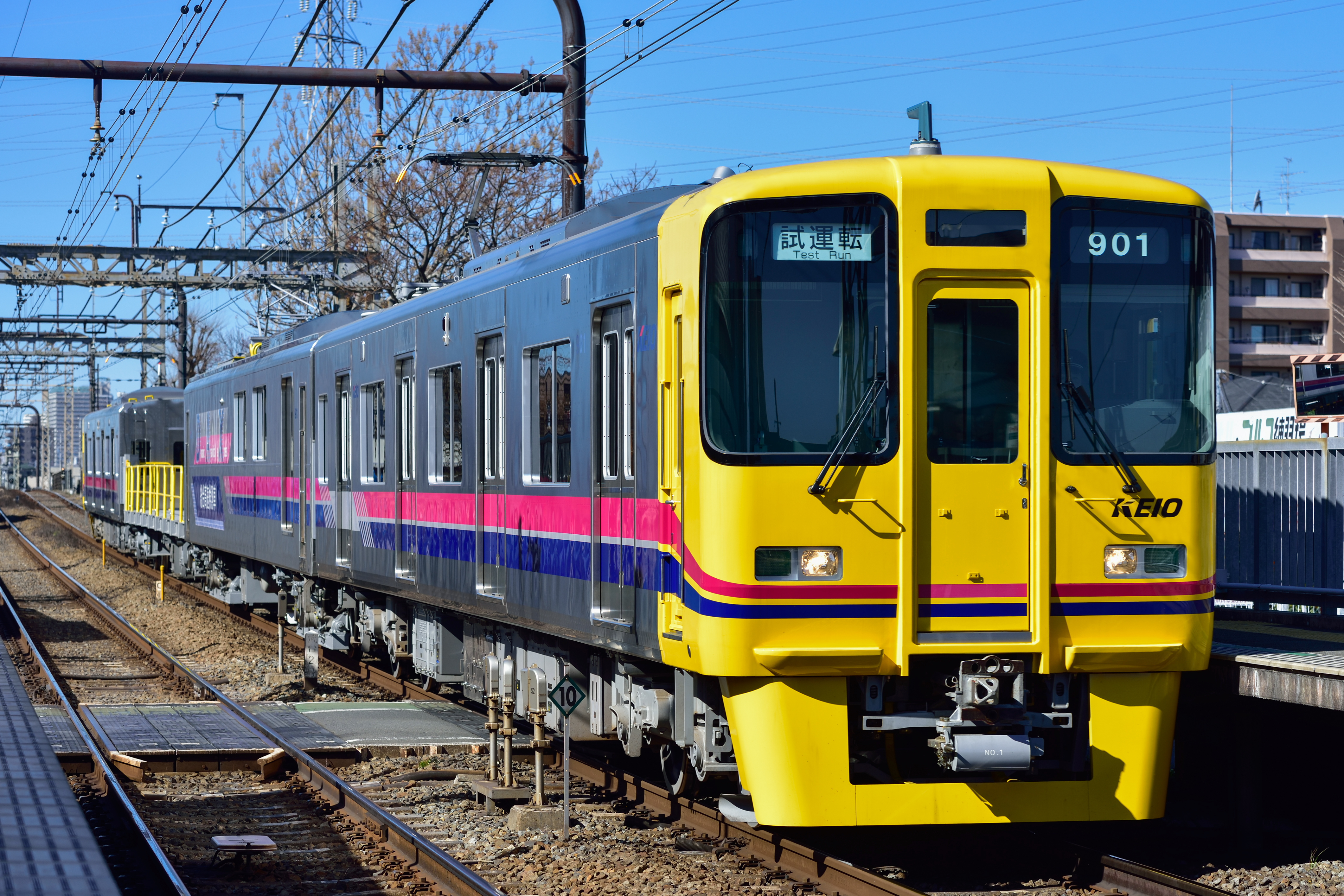 線路検測中の京王デヤ900形。武蔵野台駅。